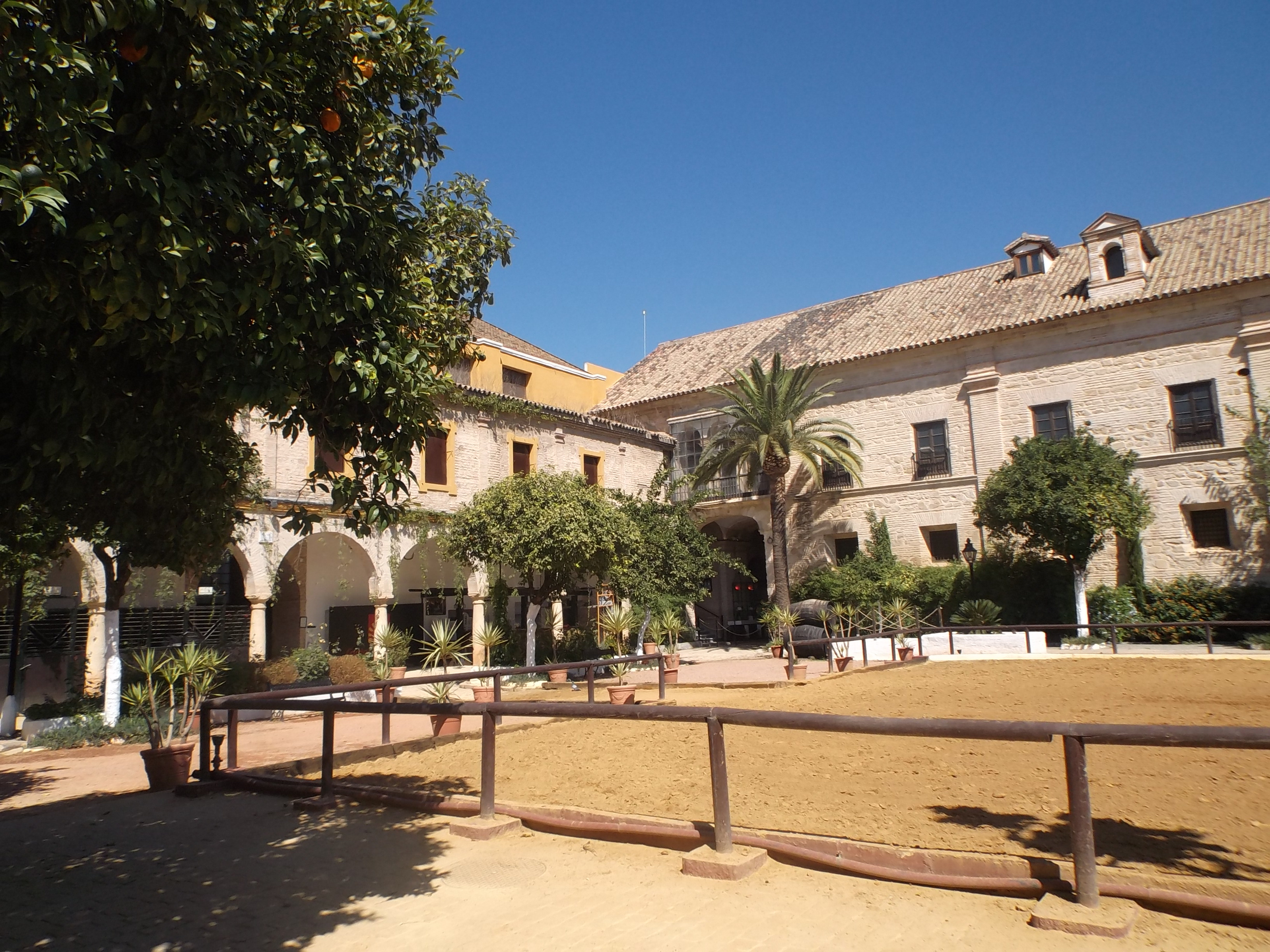 Caballerizas Reales de Cordoba, España.